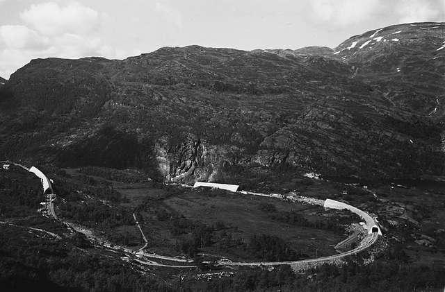 Flåmsbana mellom Vatnahalsen haldeplass og Reinunga haldeplass